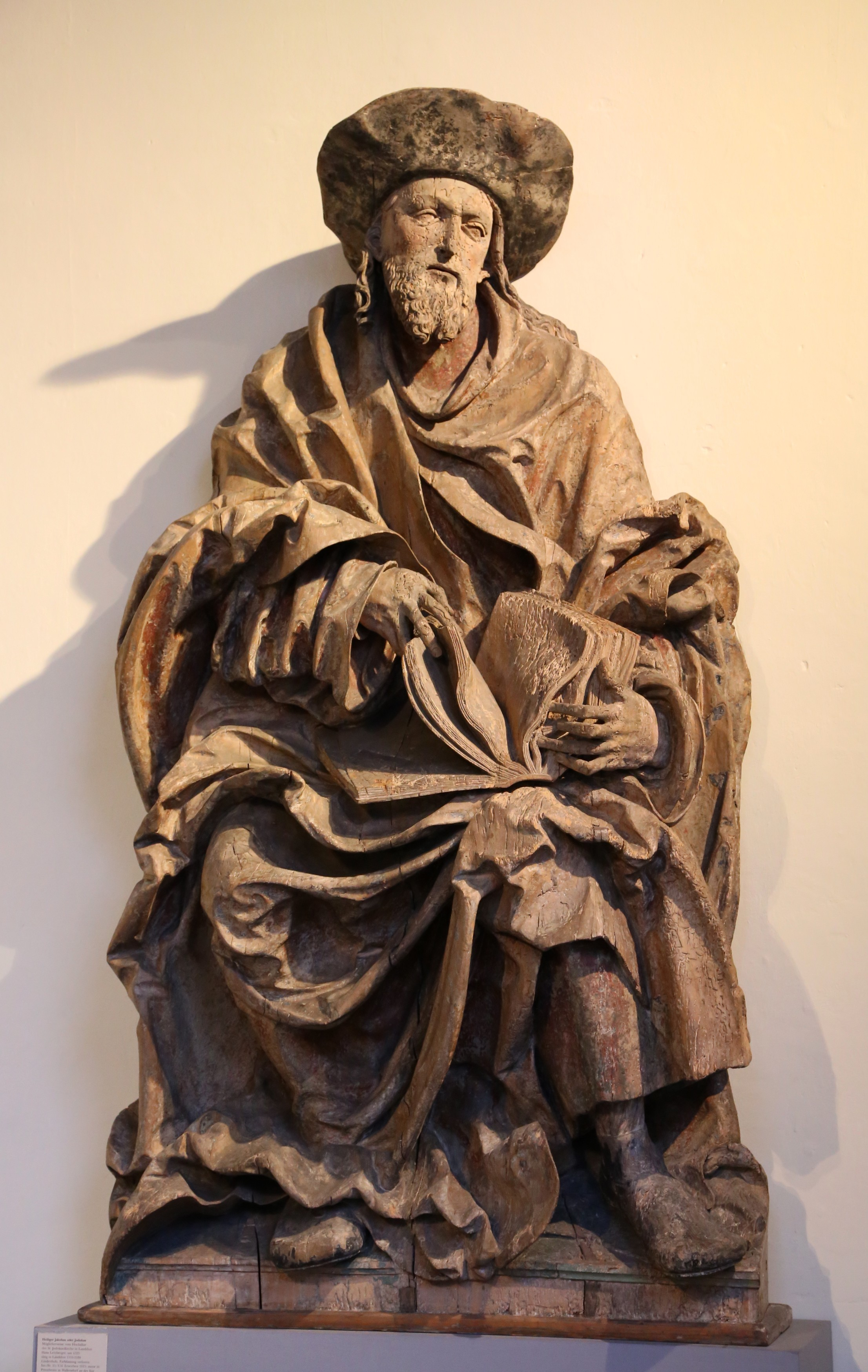 Hans Leinberger: Hl. Jakobus oder Jodokus, um 1525, Lindenholz, Farbfassung verloren, Bayerisches Nationalmuseum in München